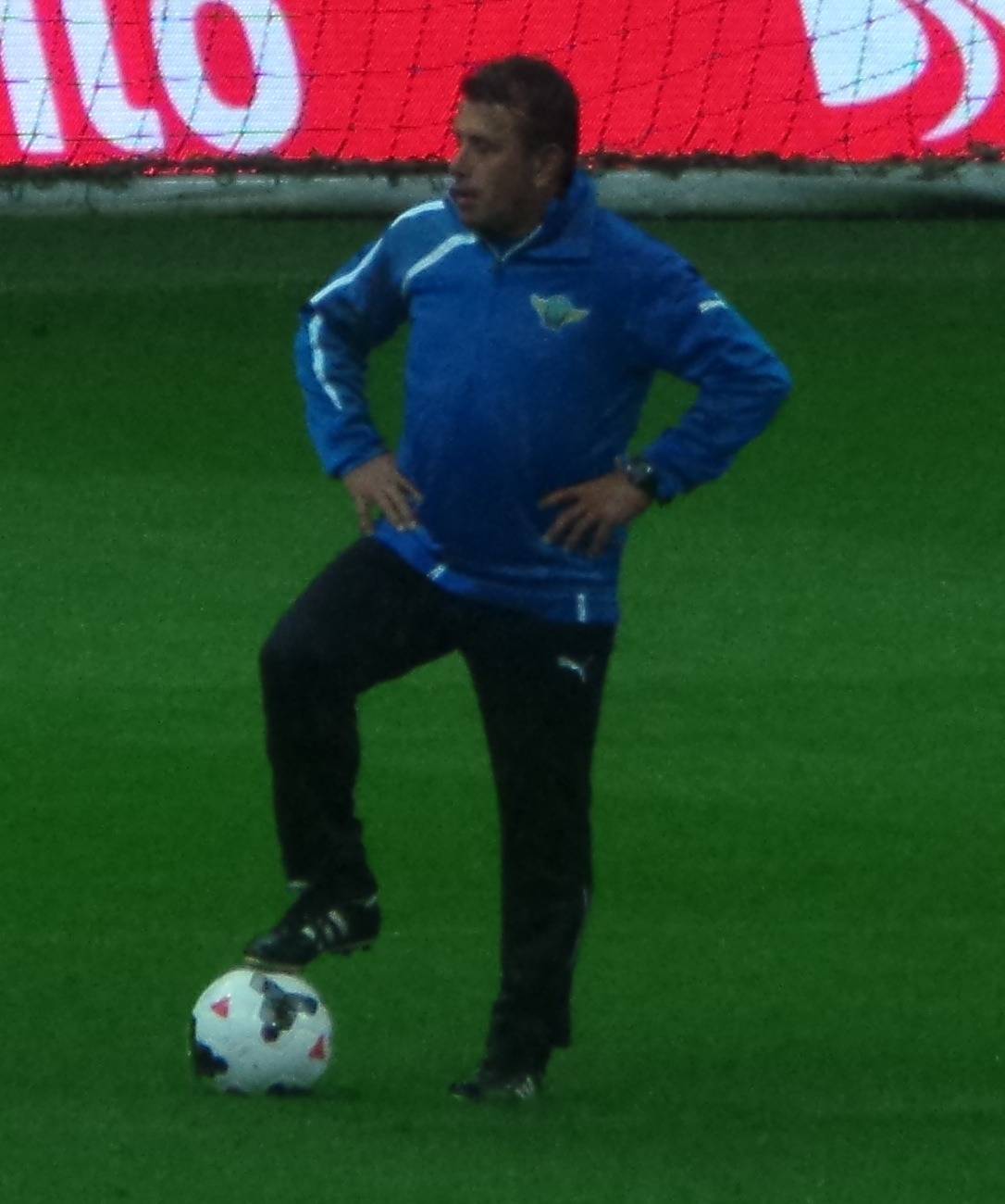 Fuat nihat buruk